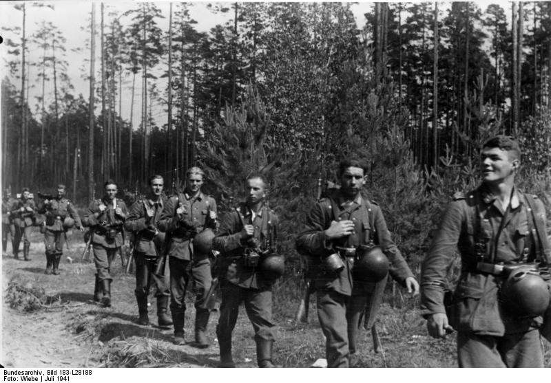 Russland, Infanterie geht am Wald vor. Scherl An der Sowjetfront: Regiment Grossdeutschland rückt auf der Panzerrollbahn in einen Wald, um diesen von Heckenschützen zu säubern. PK-Aufnahme: Kriegsberichter:Wiebe Juli 41 7055-41